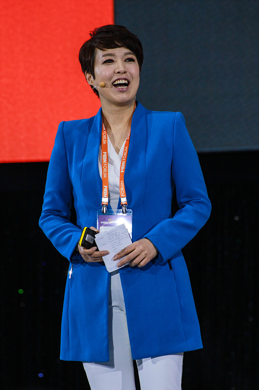 2017 02월 22일 MBN Y Forum 2017 김은혜 MBN 특임이사 겸 앵커